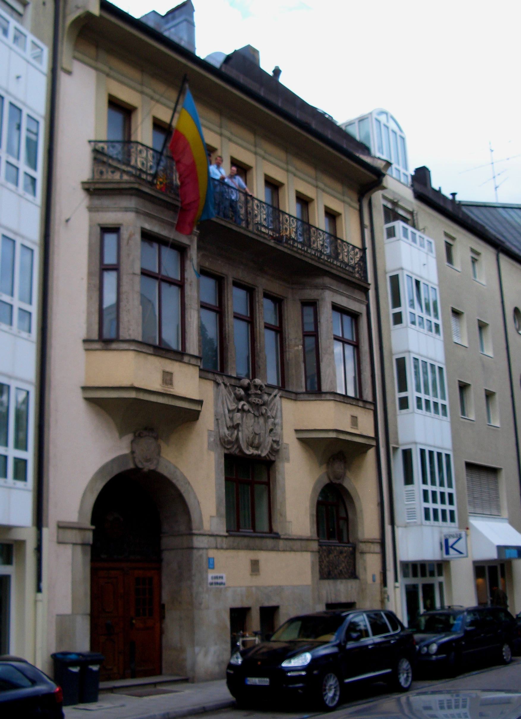 Corpshaus der Germania in Muenchen-Altstadt